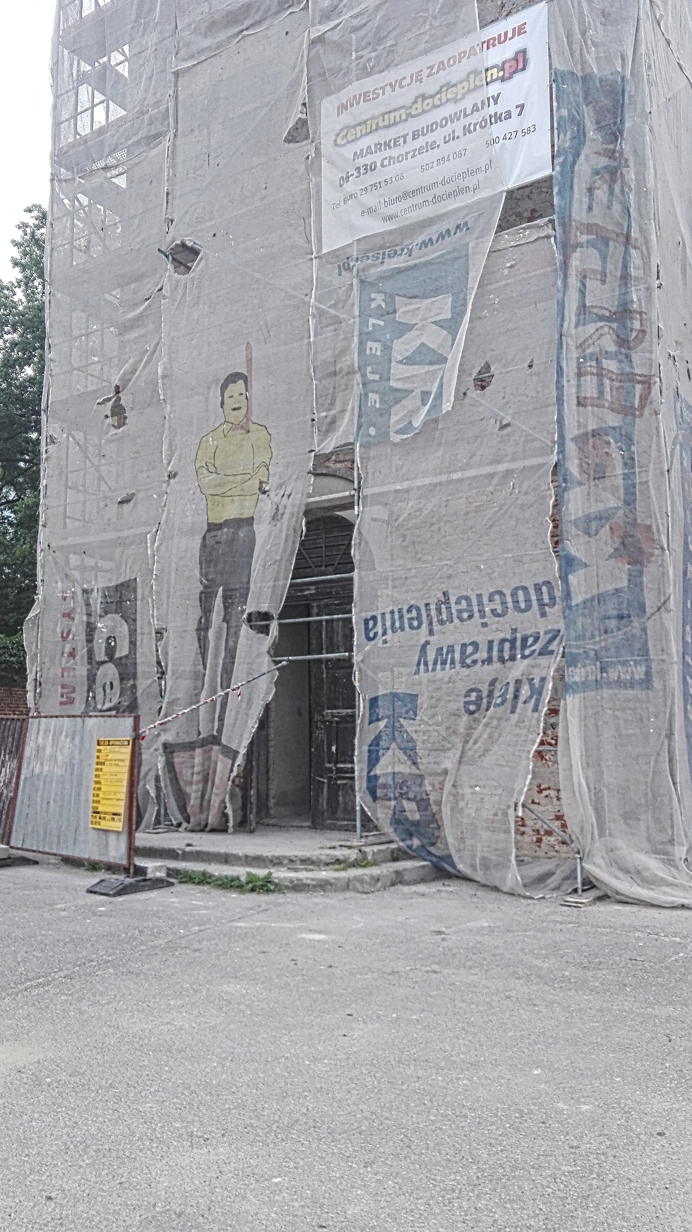 Wielbark, Kościół ewangelicki w trakcie remontu w 2016 Wikidata has entry Q32050712 with data related to this item.